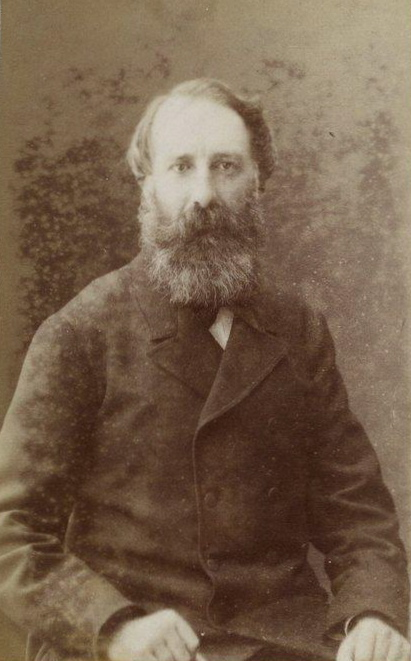 Georges Picot (1838-1909), secrétaire perpétuel de l'Académie des sciences morales et politiques